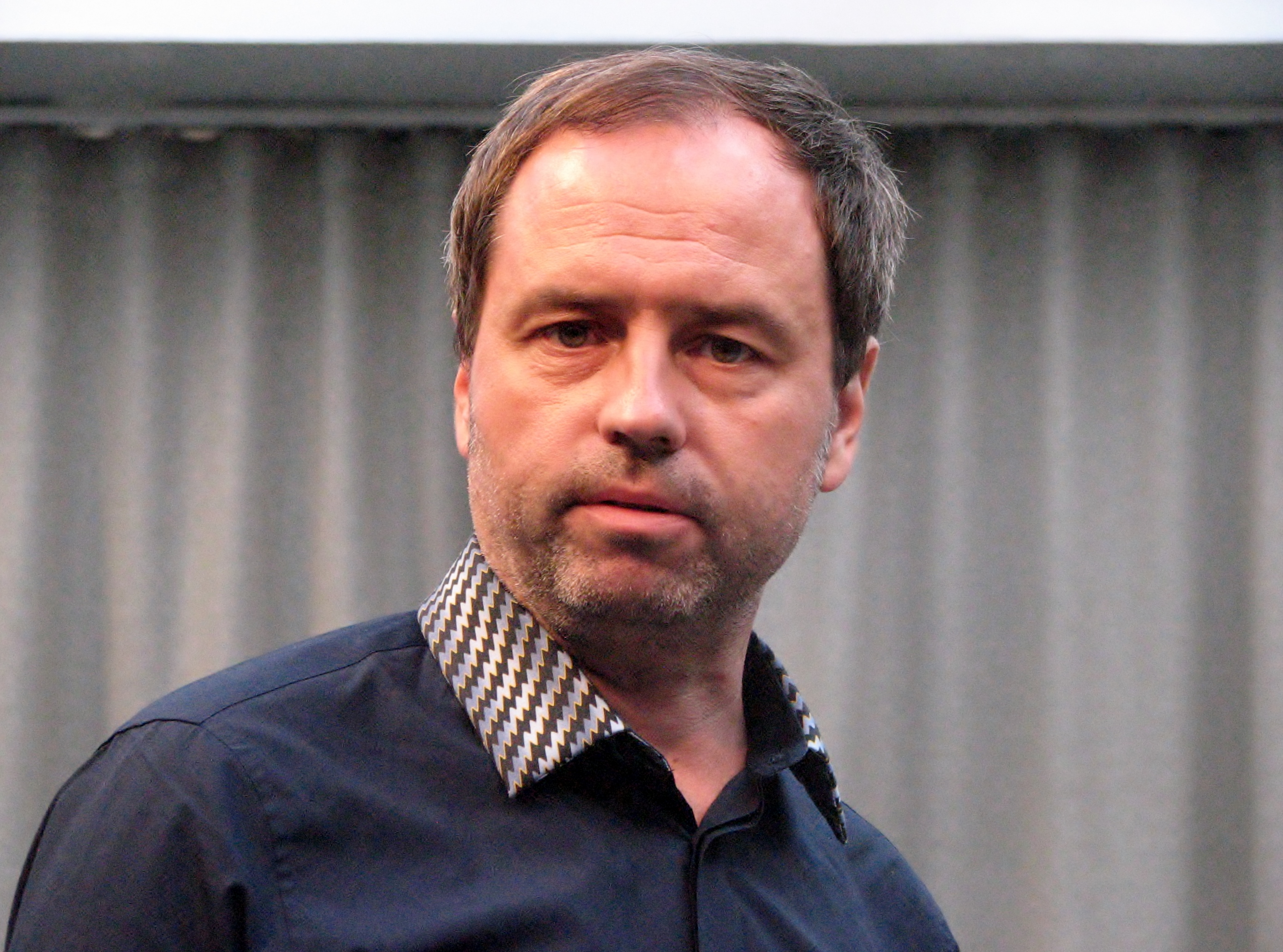 Tõnu Kõrvits Estonia maja juubelipidustuste raames autogrammitunnis